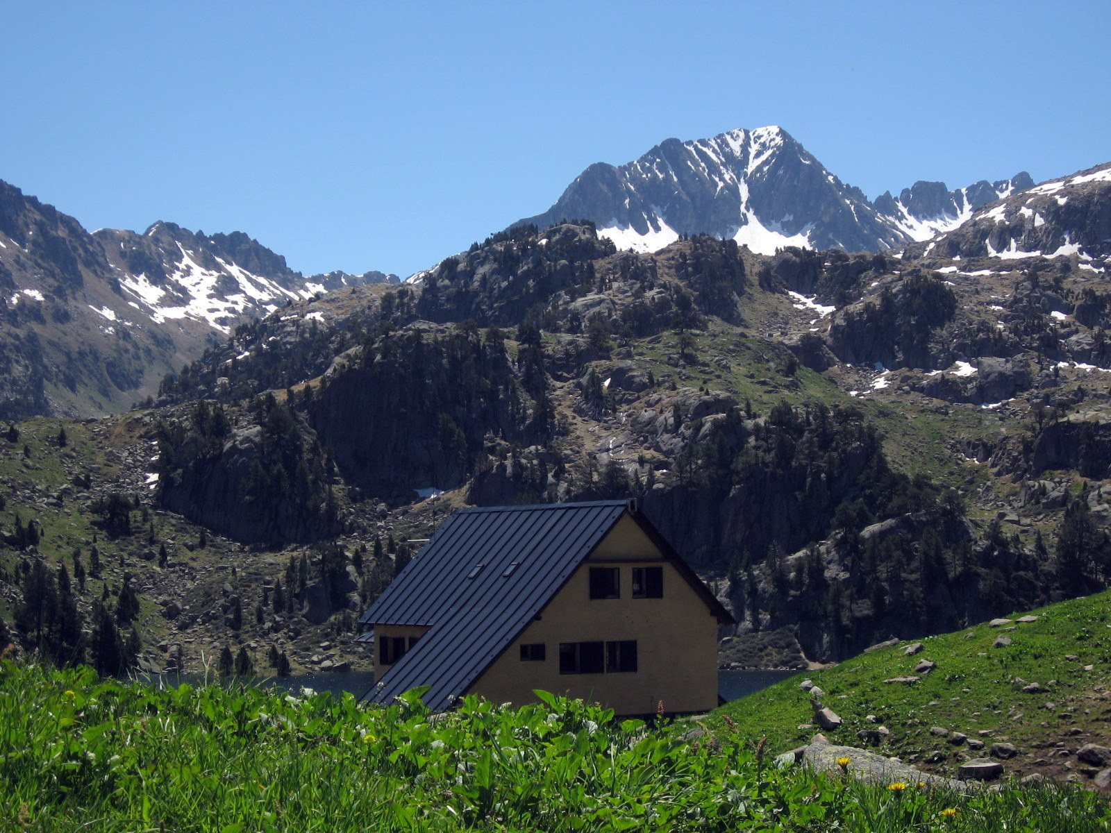 Refugi de Colomers